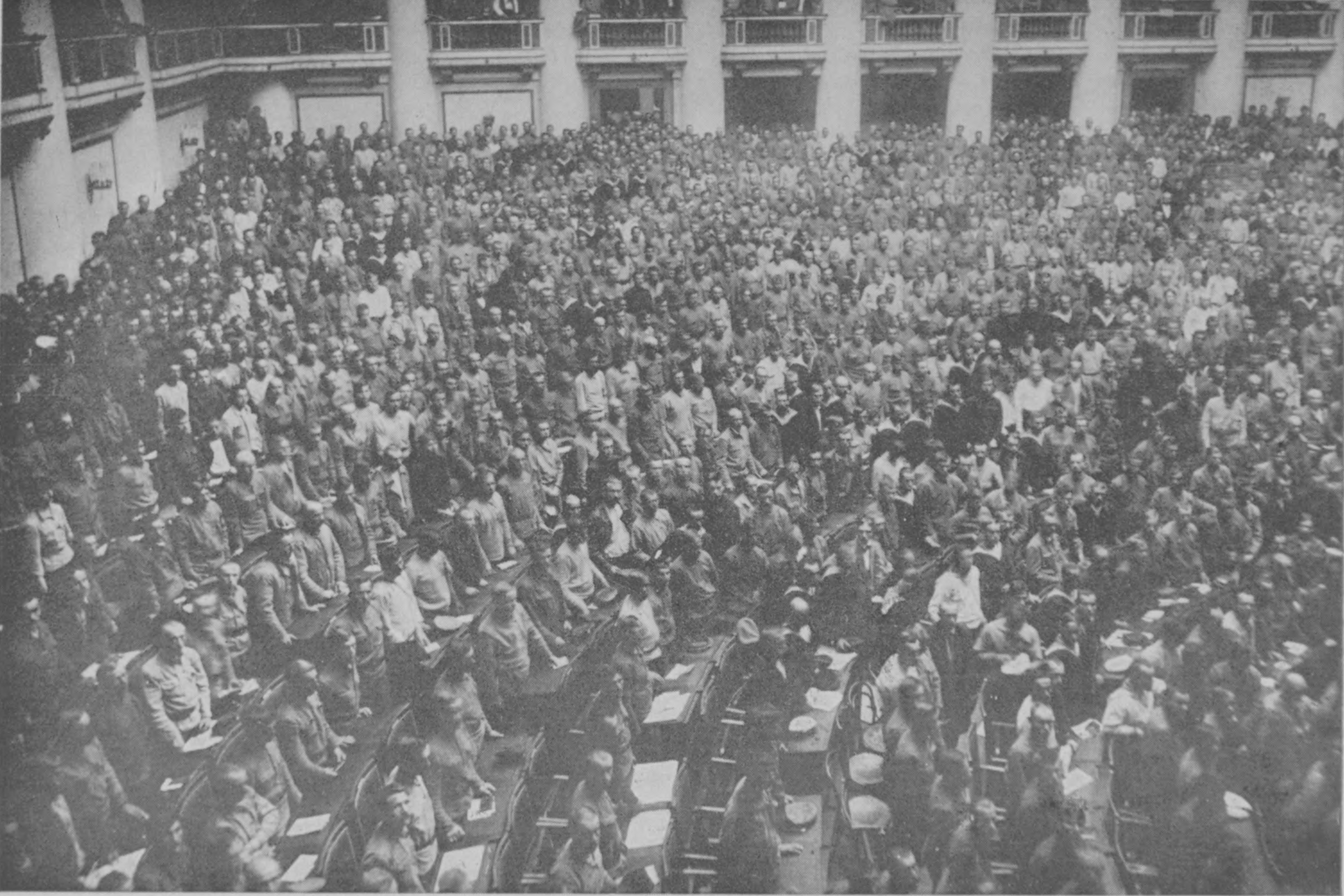 Sesión del Consejo de Petrogrado.